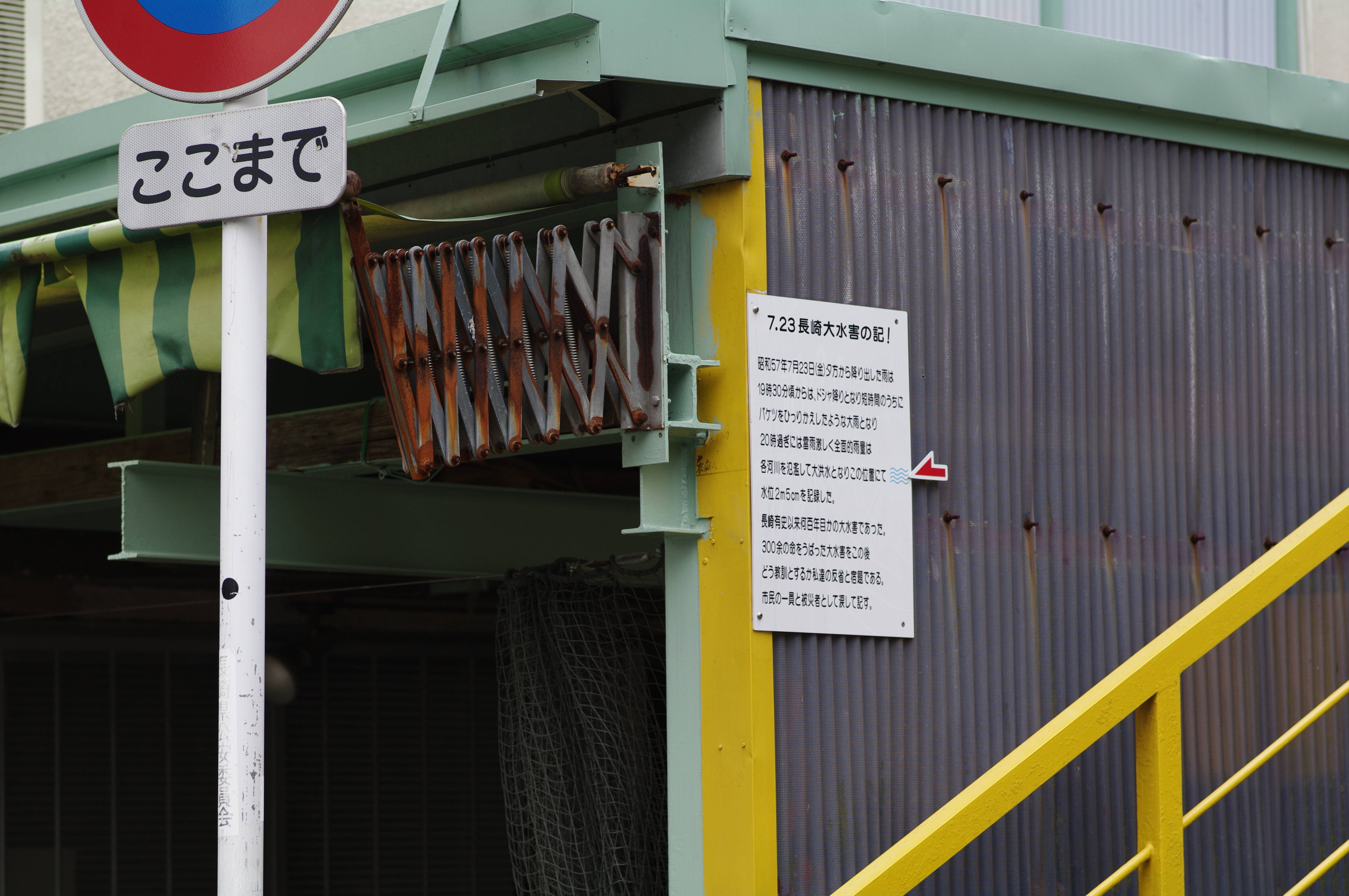 長崎大水害の記憶